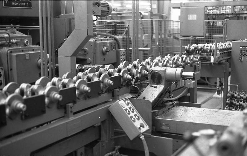 VW-Werk Salzgitter Kurbelwellenfertigung Information added by Wikimedia users.Unfinished engine crankshafts